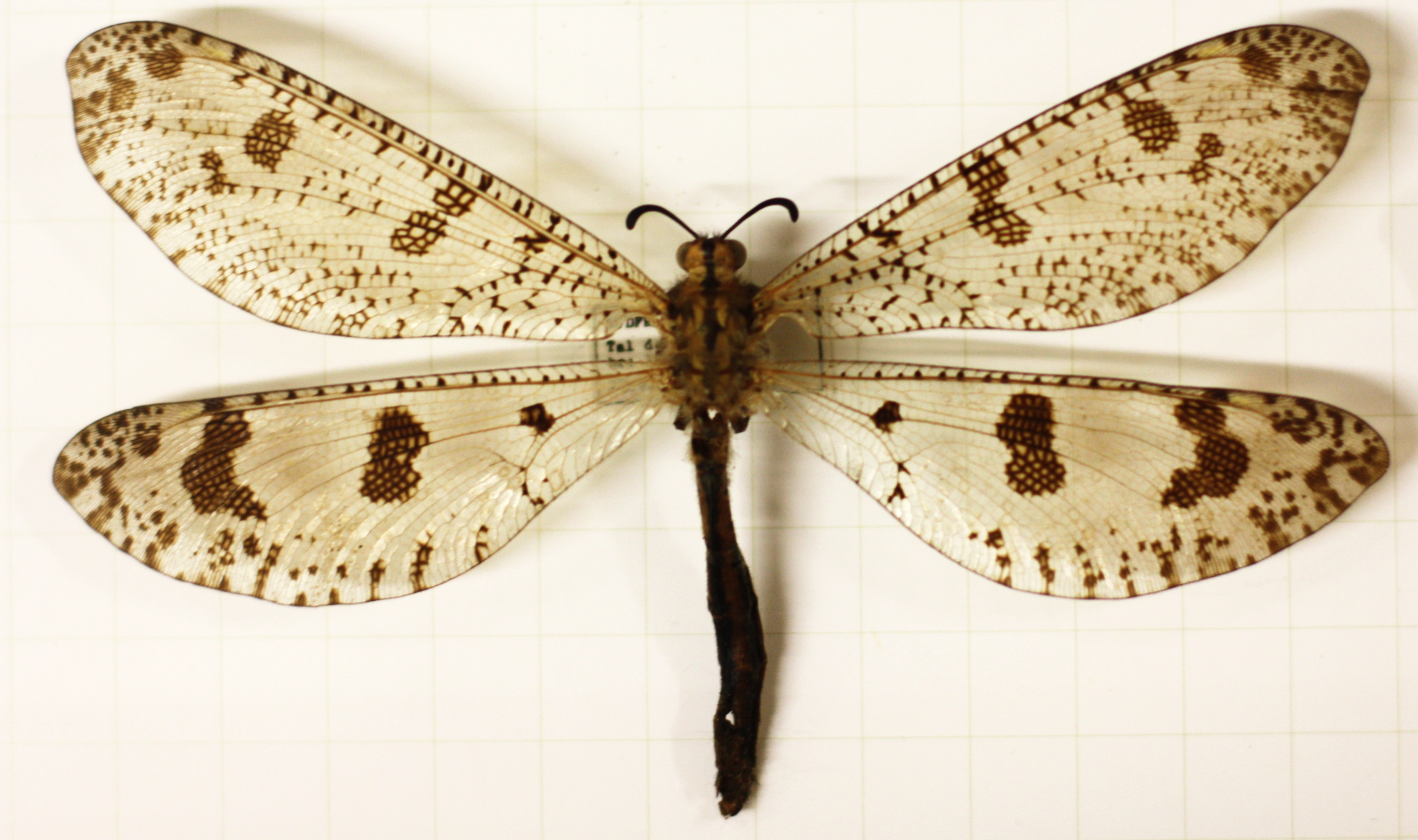 Naturkundliche Sammlung Übermaxx Überseenuseum Bremen; Schmetterlinge und andere